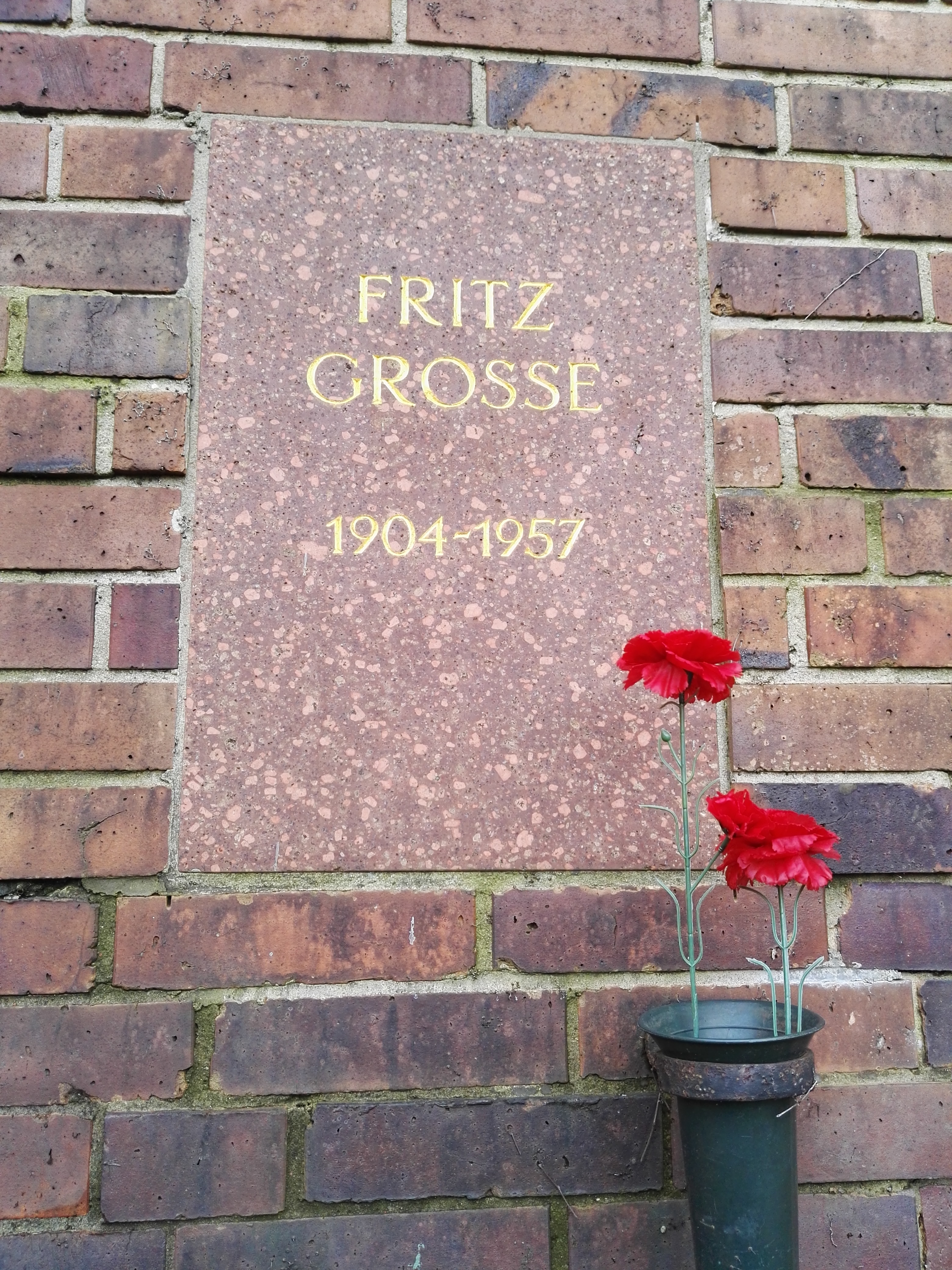 Grab von Fritz Große in der Gedenkstätte der Sozialisten auf dem Zentralfriedhof Friedrichsfelde in Berlin-Lichtenberg